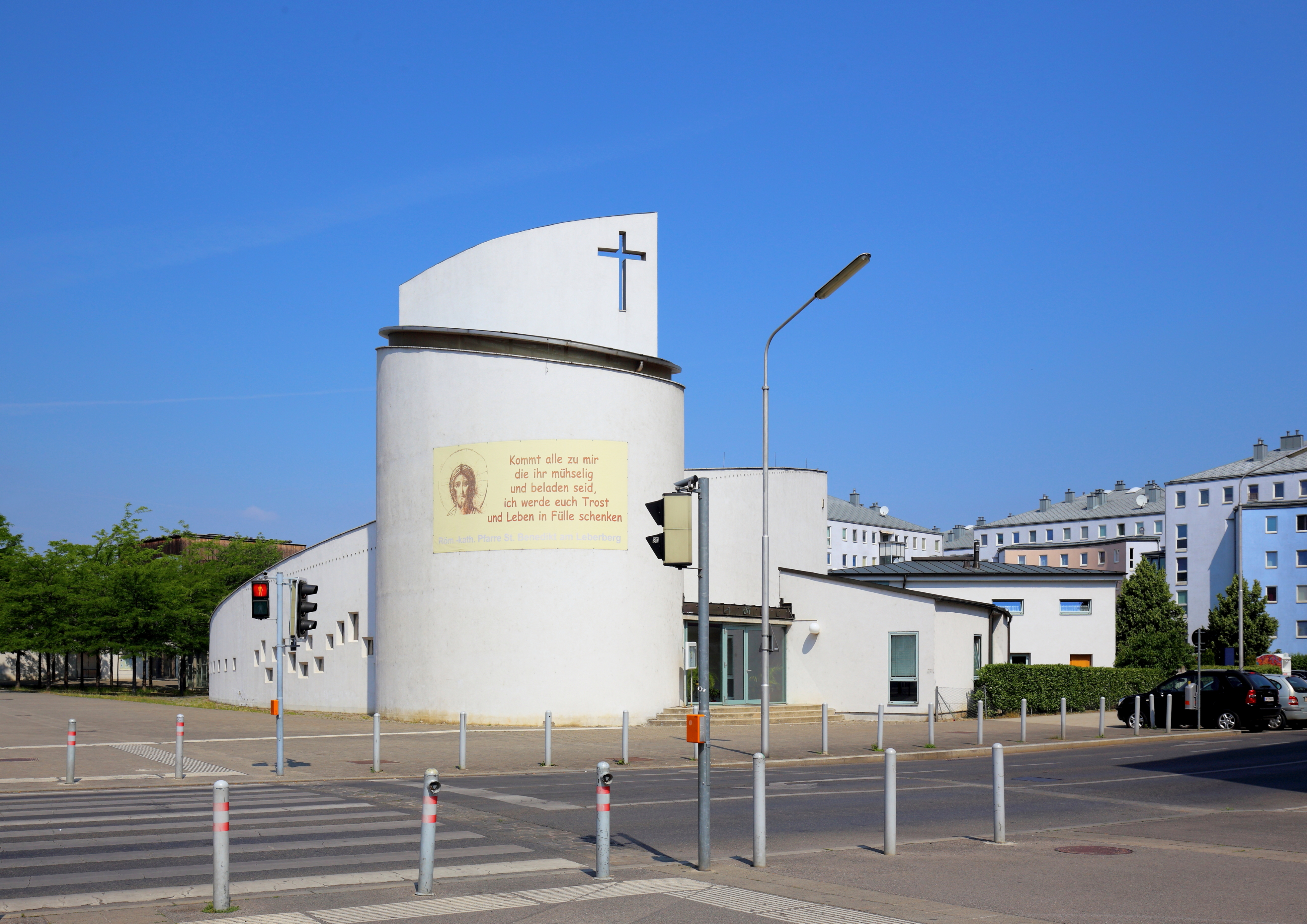 Südostansicht der Pfarrkirche St. Benedikt am Leberberg im 11. Wiener Gemeindebezirk Simmering.